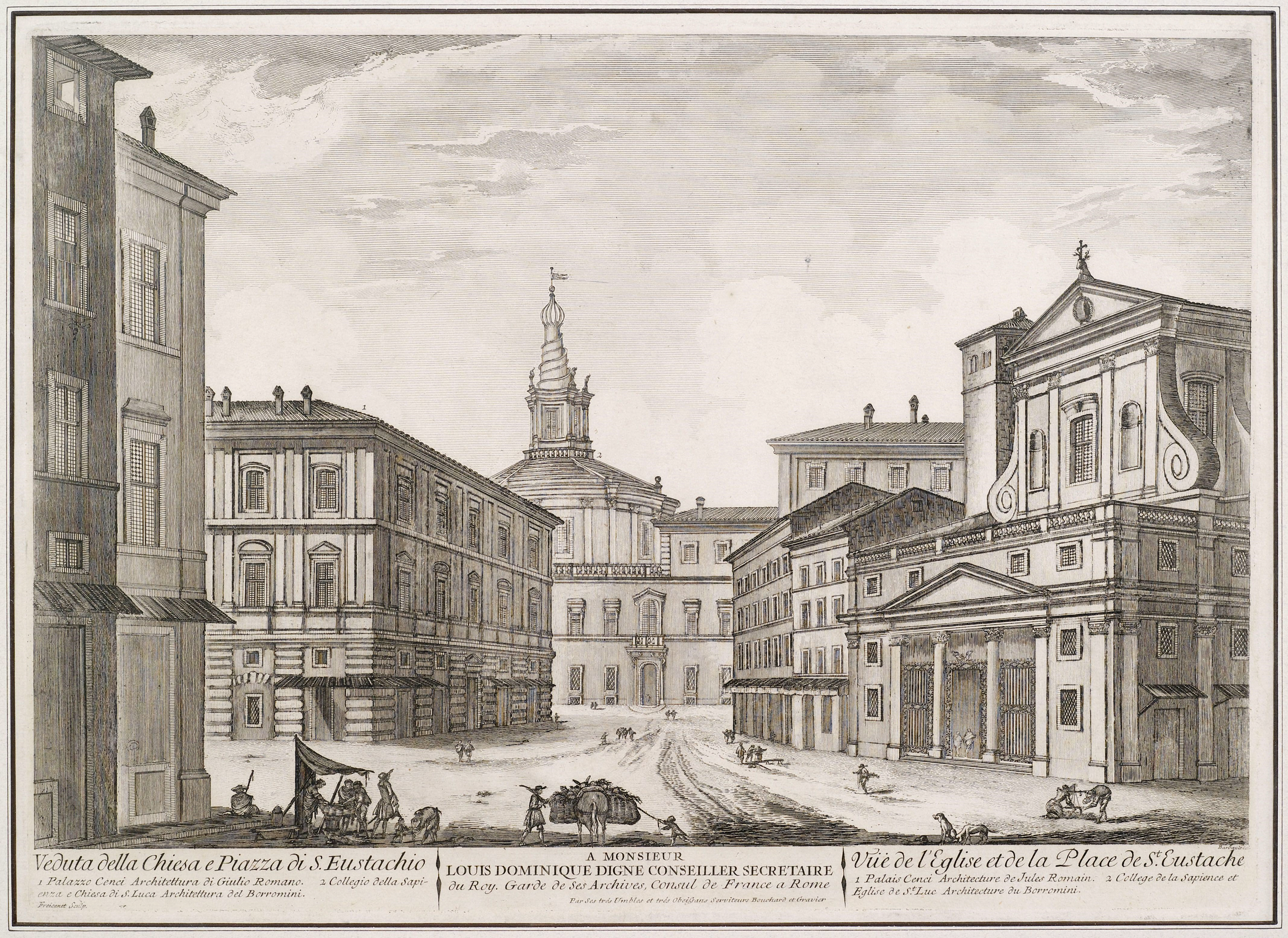 Roma, Veduta della Chiesa e di Piazza di S. Eustachio. Radierung nach Jean Barbault. 38 x 52 cm